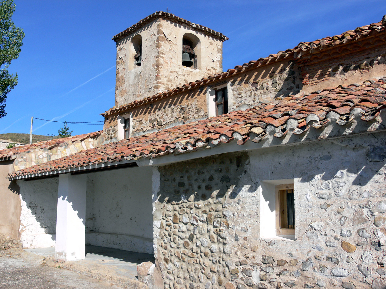 Iglesia de Santiago en Bergasillas Bajera, La Rioja - España.